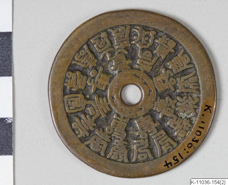 Amulettmynt. Runt hål i mitten. Skrift i relief på båda sidorna. K-11036-154 China